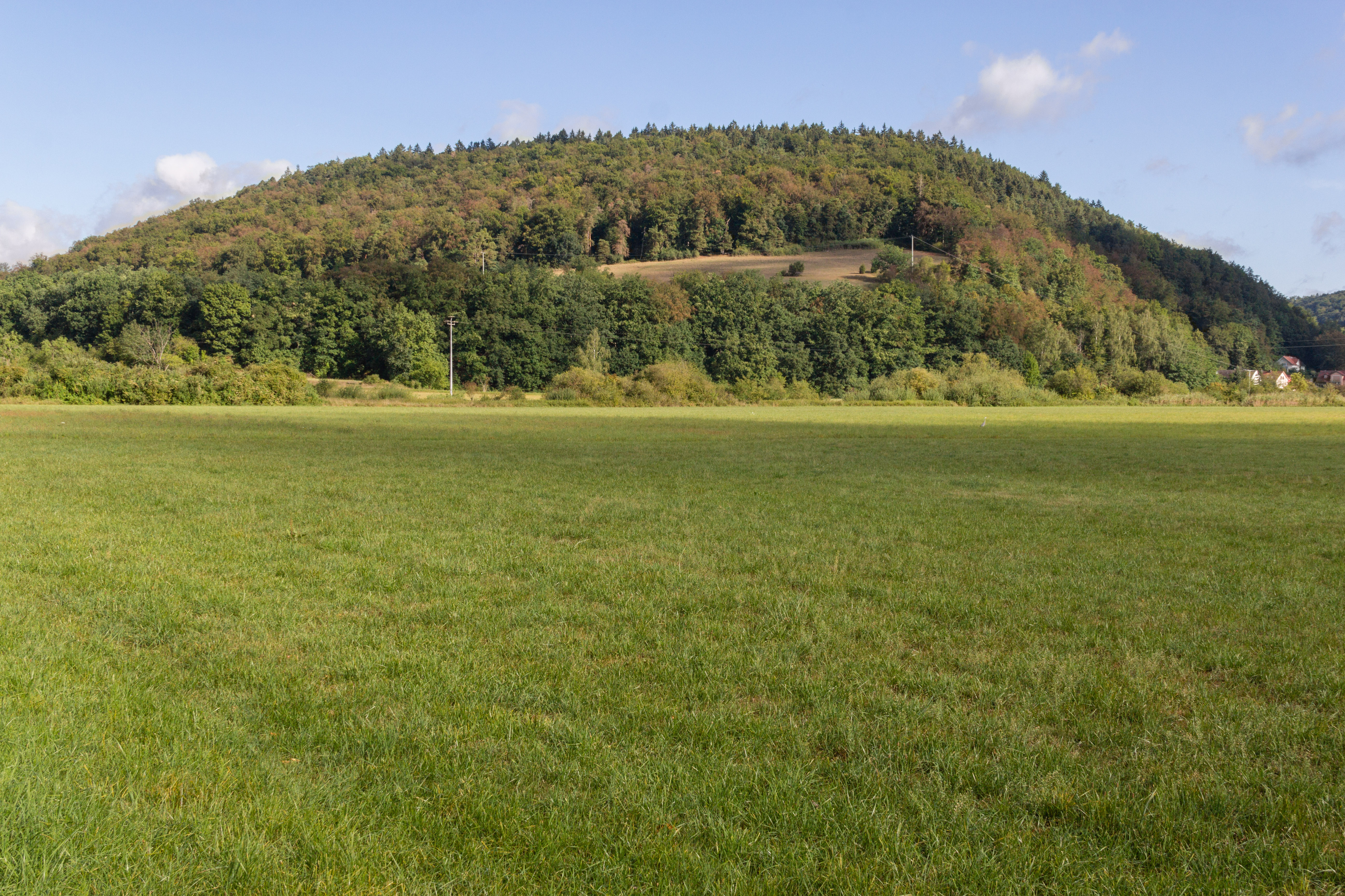 Wolfsberg, Dietfurt an der Altmühl